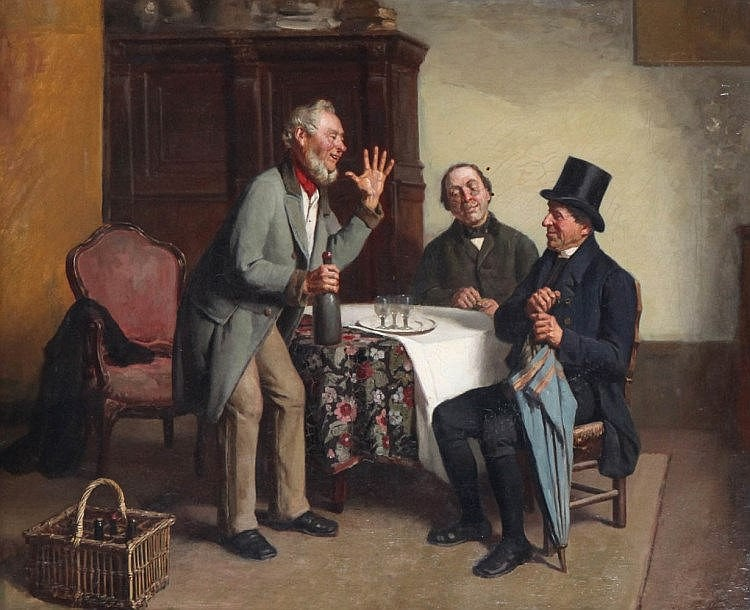 De wijnproevers